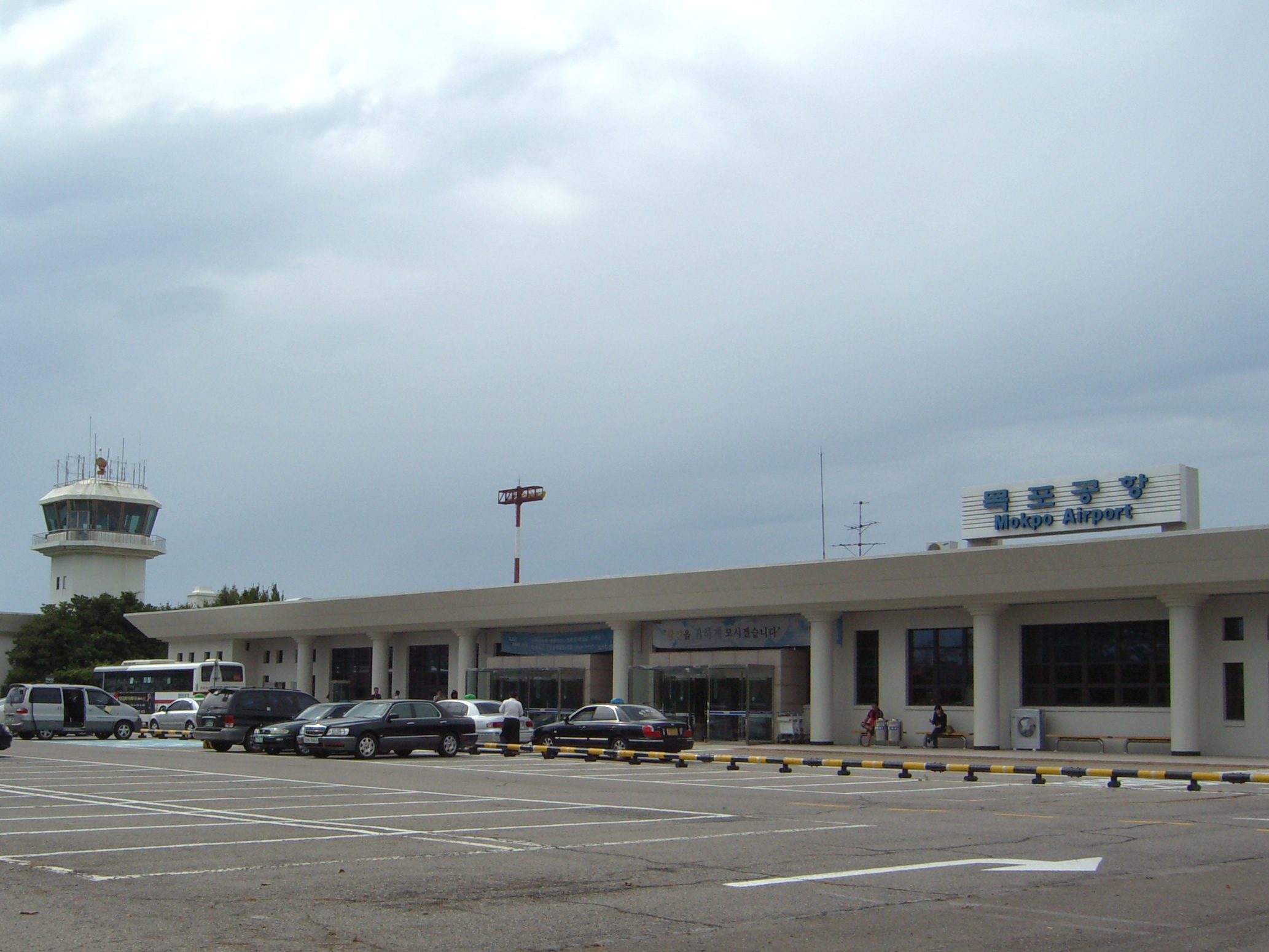 大韓民国全羅南道 木浦空港の外観